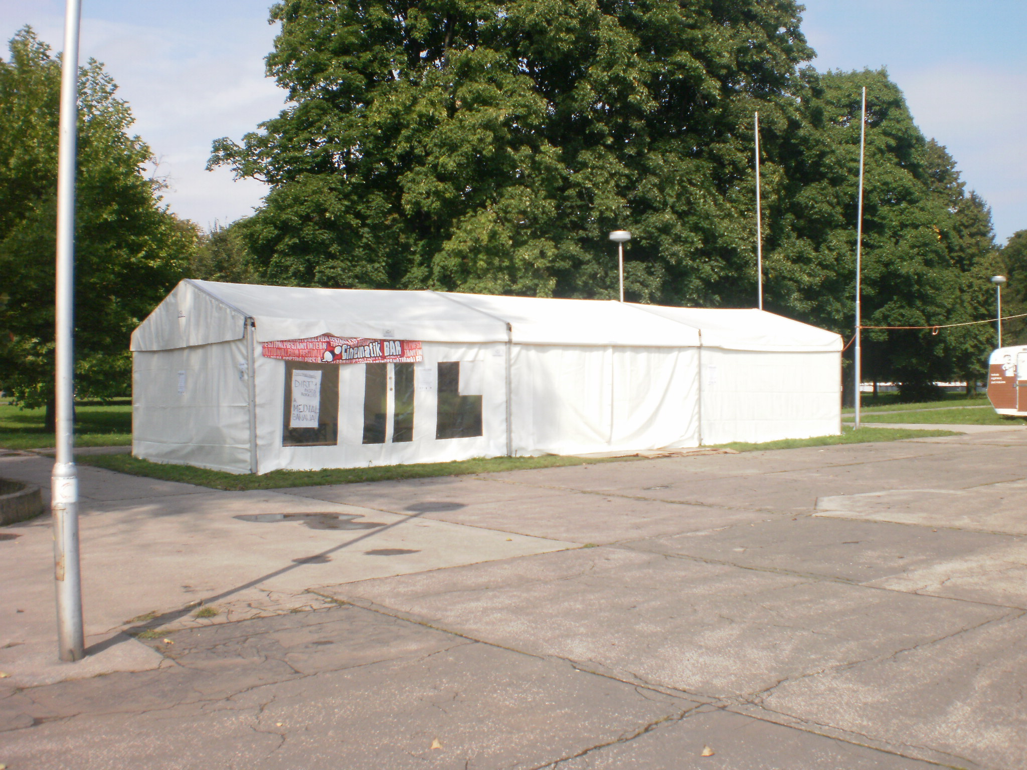 Cinematik bar pred Domom Umenia 2010.